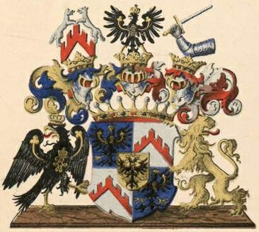 Buxhoevedeni suguvõsa krahvivapp